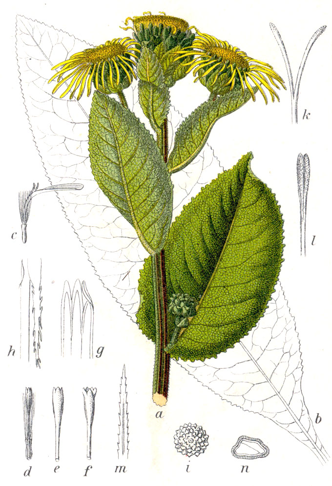 Inula helenium L. Original Caption Echter Alant, Inula helenium